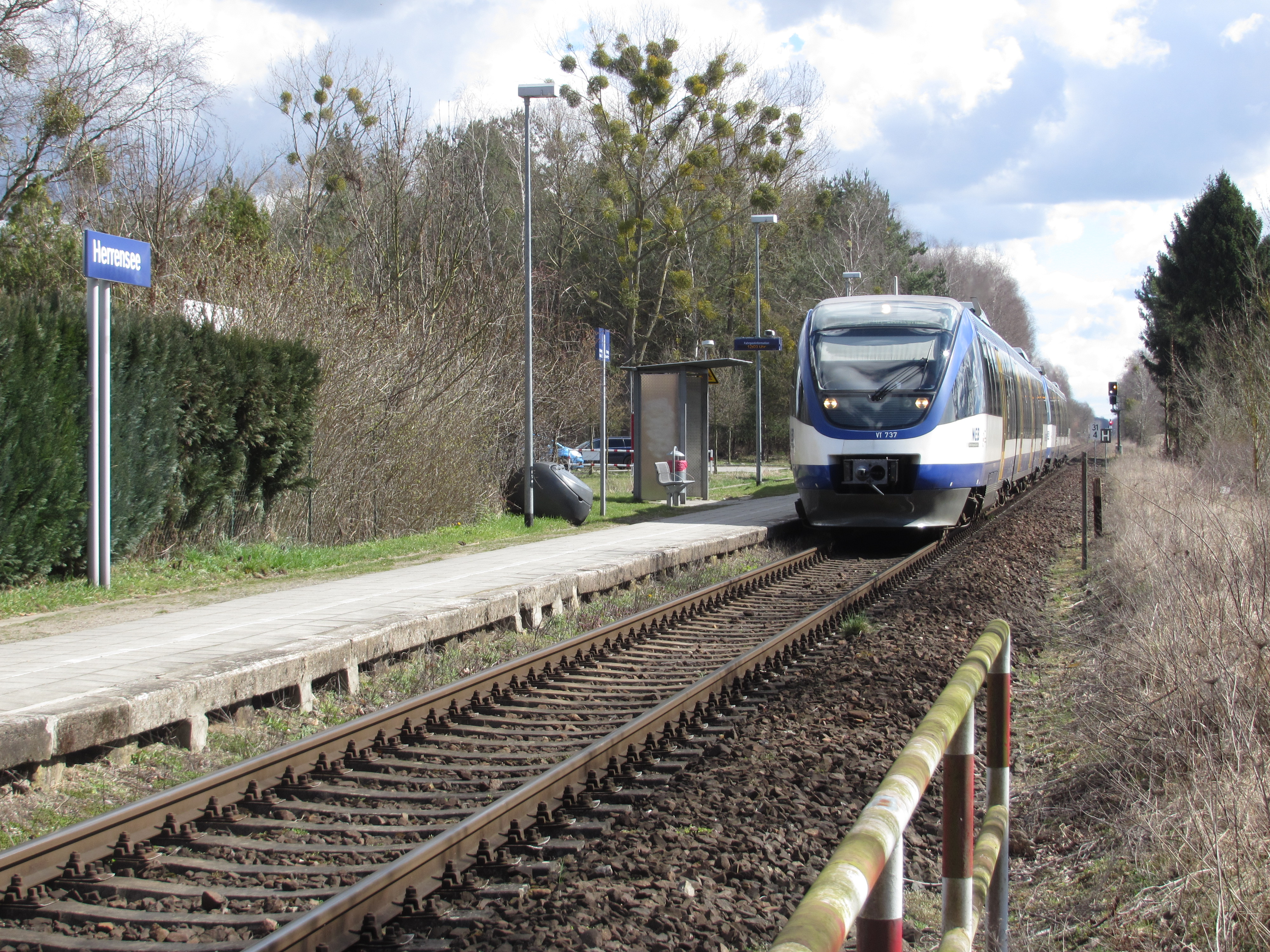 Station Herrensee der Ostbahn im Ortsteil Herrensee der Gemeinde Rehfelde mit Zug der NEB